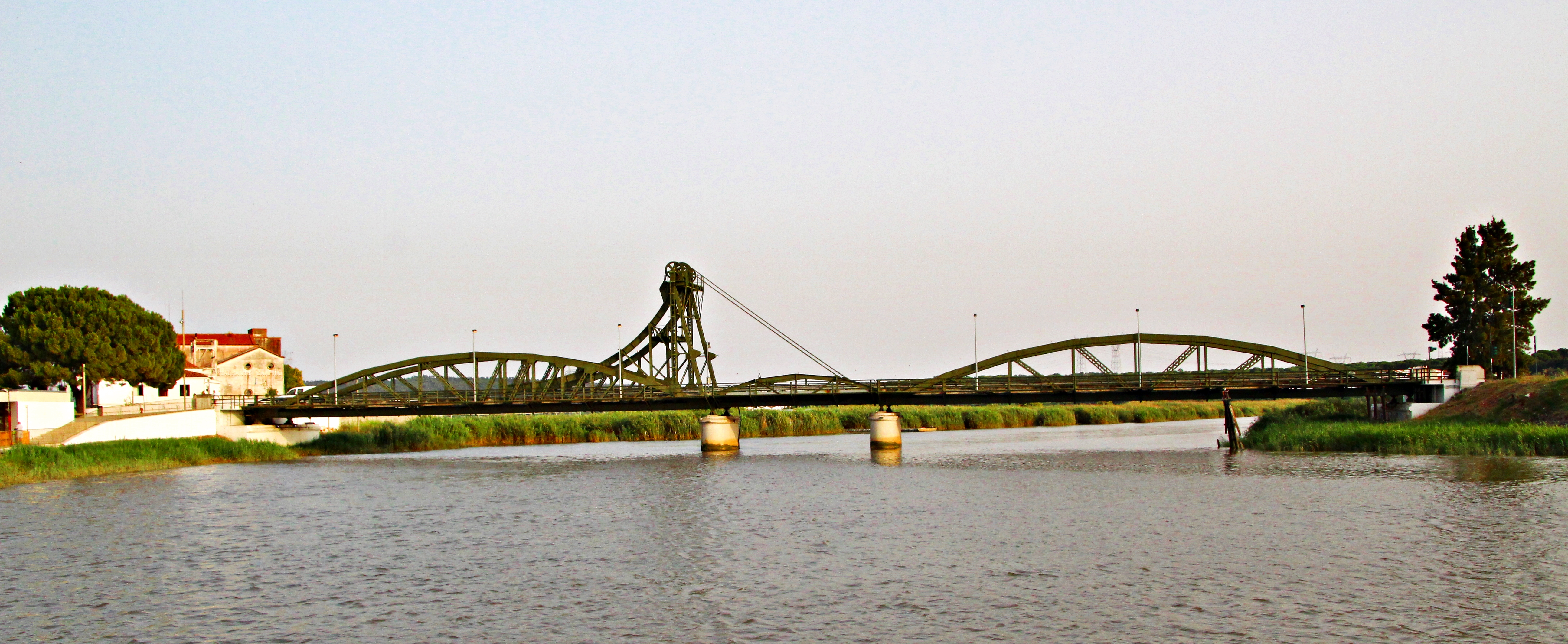 Puente Ferroviario de Alcácer do Sal, el Algarve